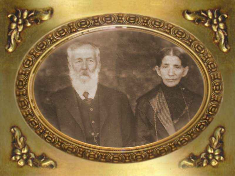 O capitão Domingos Ferreira Marques e a esposa Feliciana Francisca Dias, doadores das terras do Curato do Espirito Santo do Guarará